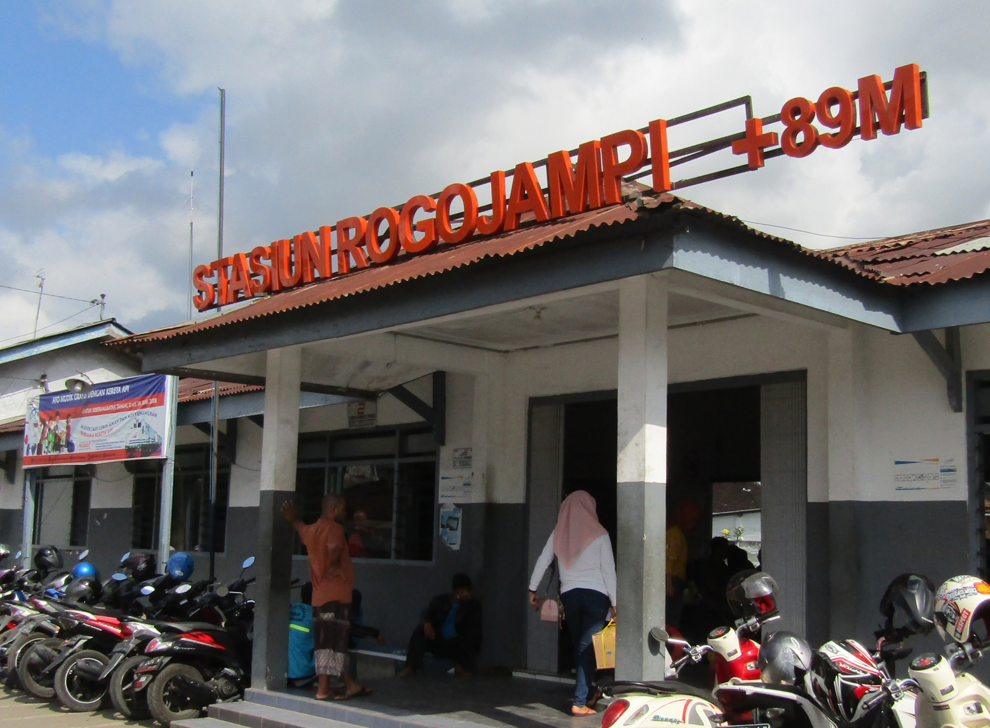 Stasiun Rogojampi, 2018